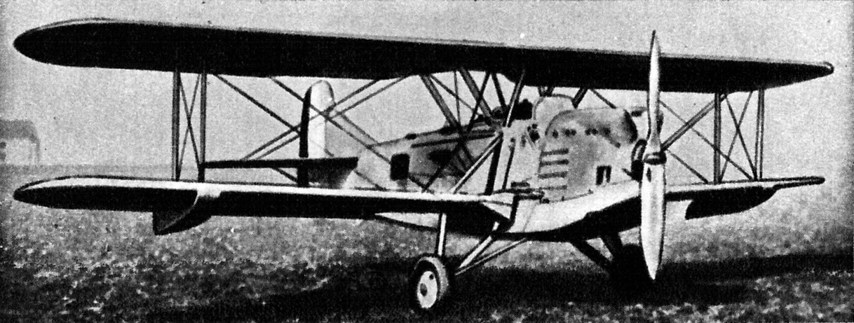 Francuski pokładowy samolot rozpoznawczy Levasseur PL.101.